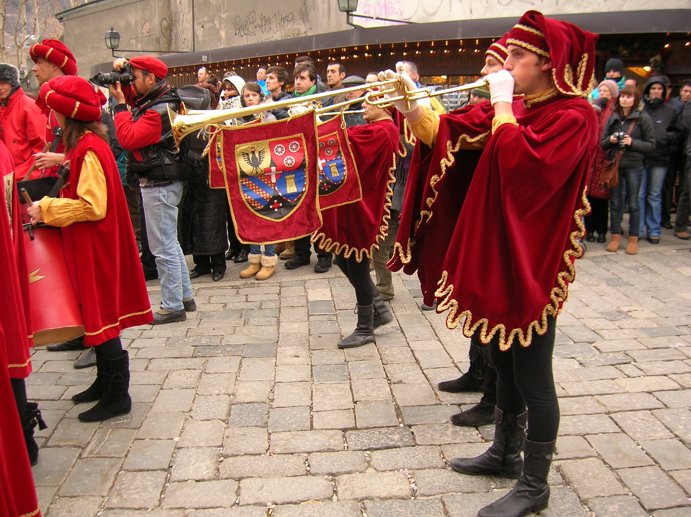 Musici in costume medievale al "Carnavals de montagne" (Aosta, Valle d'Aosta, Italia.). In primo piano, un trombettiere suona una chiarina ad un pistone, una tromba dritta che imita le chiarine naturali medievali ma con l'aggiunta di un pistone. Questo tipo di chiarina fu ideata appositamente per l'esecuzione della "Marcia Trionfale" dell'Aida di Giuseppe Verdi.